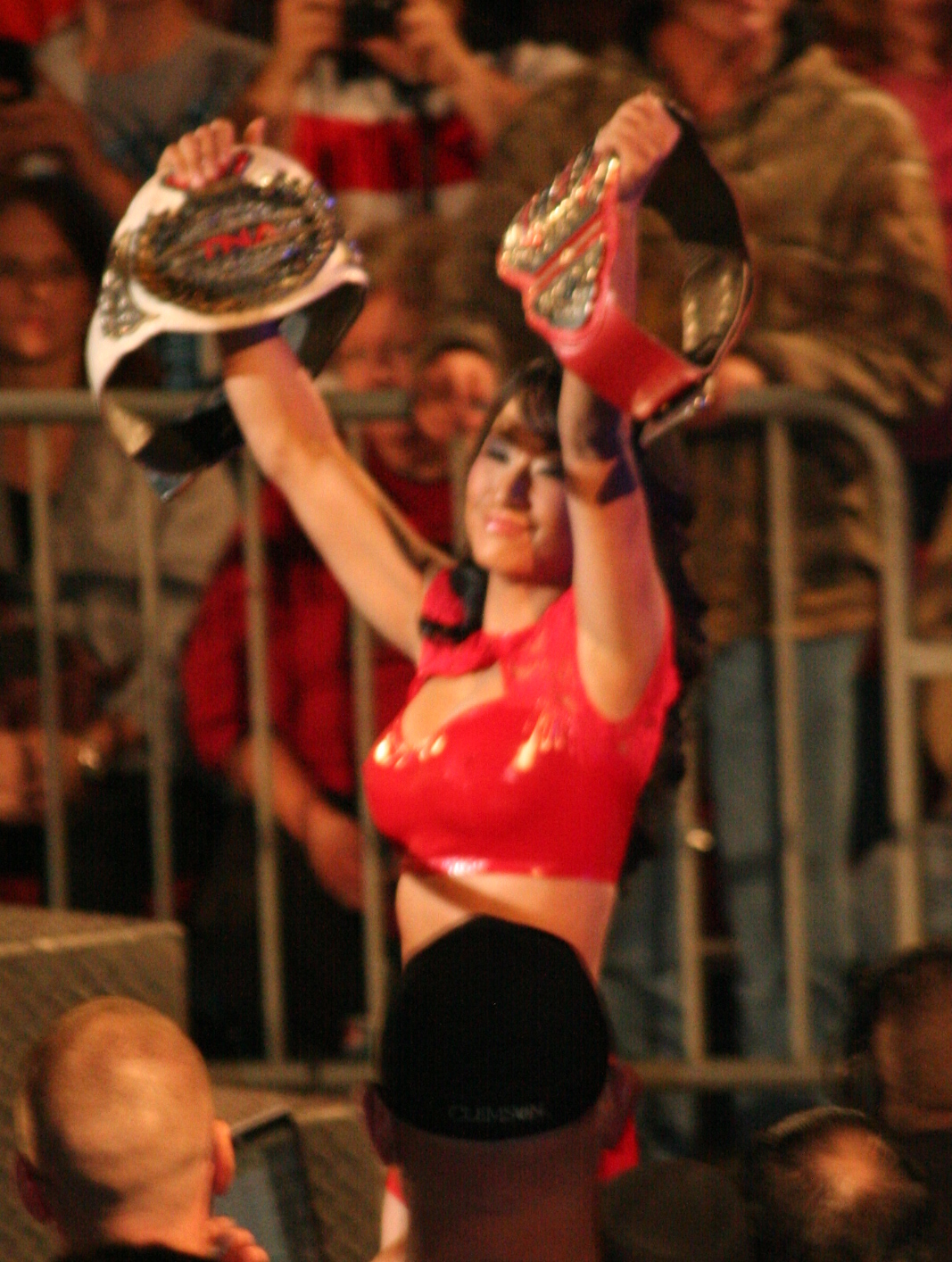 Gail Kim